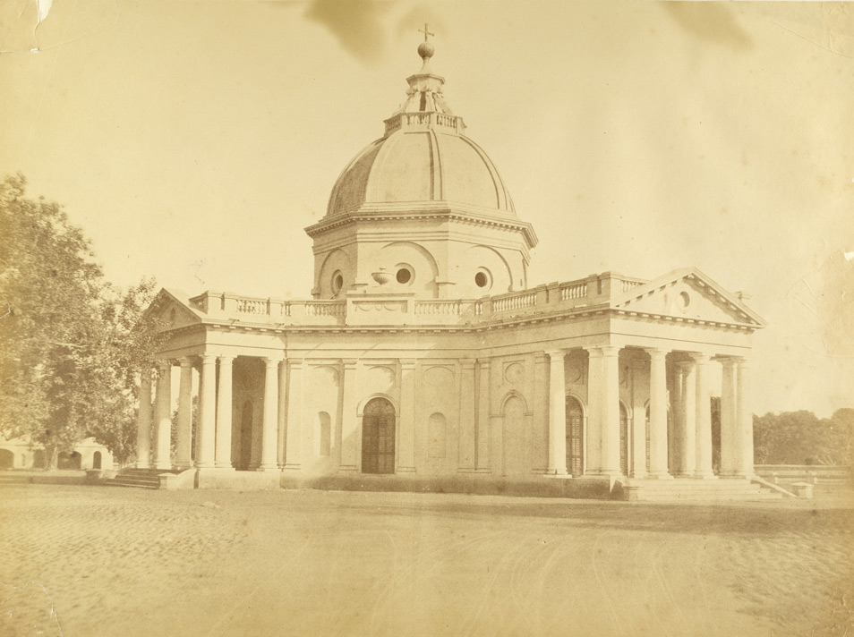 Skinner's Church, Delhi